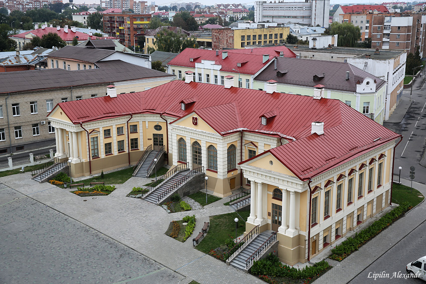 Палаца Бутрымовіча зверху